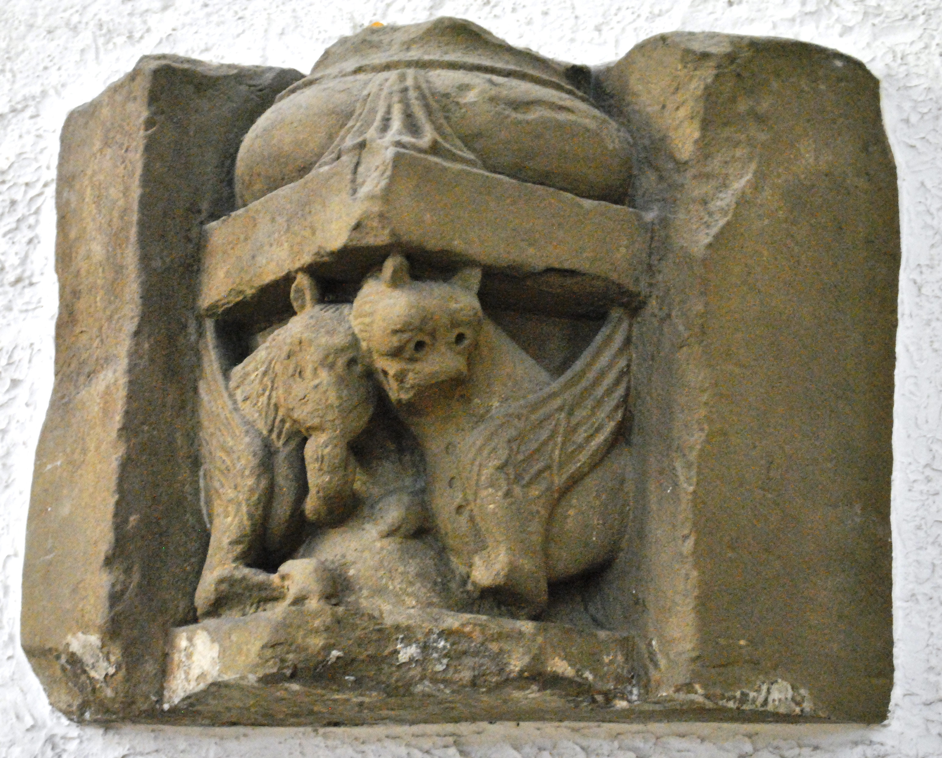 Eckstein mit zwei Greifen, Münsterschwarzach 1152/1181